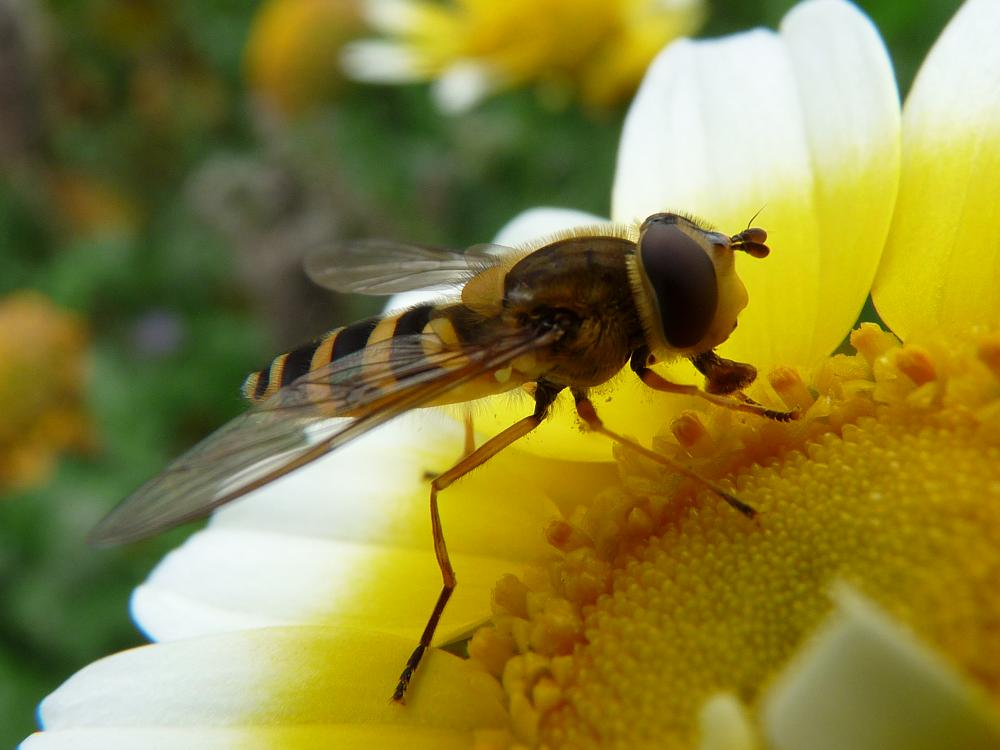 Bessenbandzweefvlieg Vrouwtje